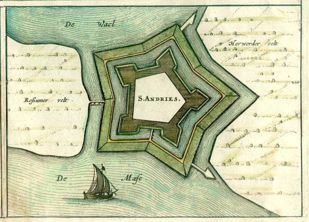 titel=S Andries